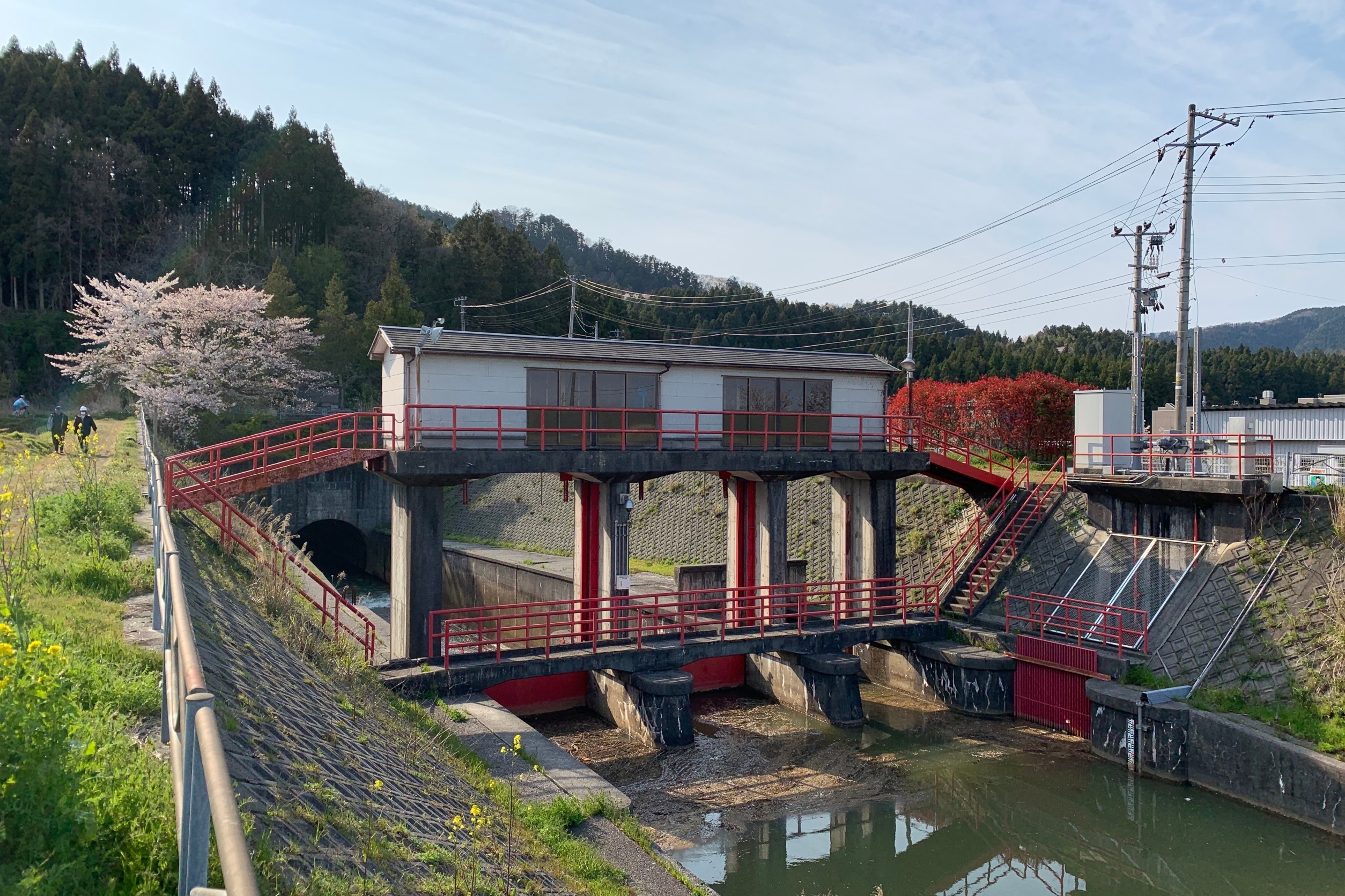 新樋曽山隧道、平野側（2020年4月）